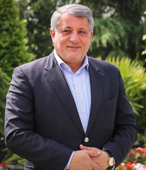 افتتاح شانزدهمین نمایشگاه بین‌المللی گل و گیاه